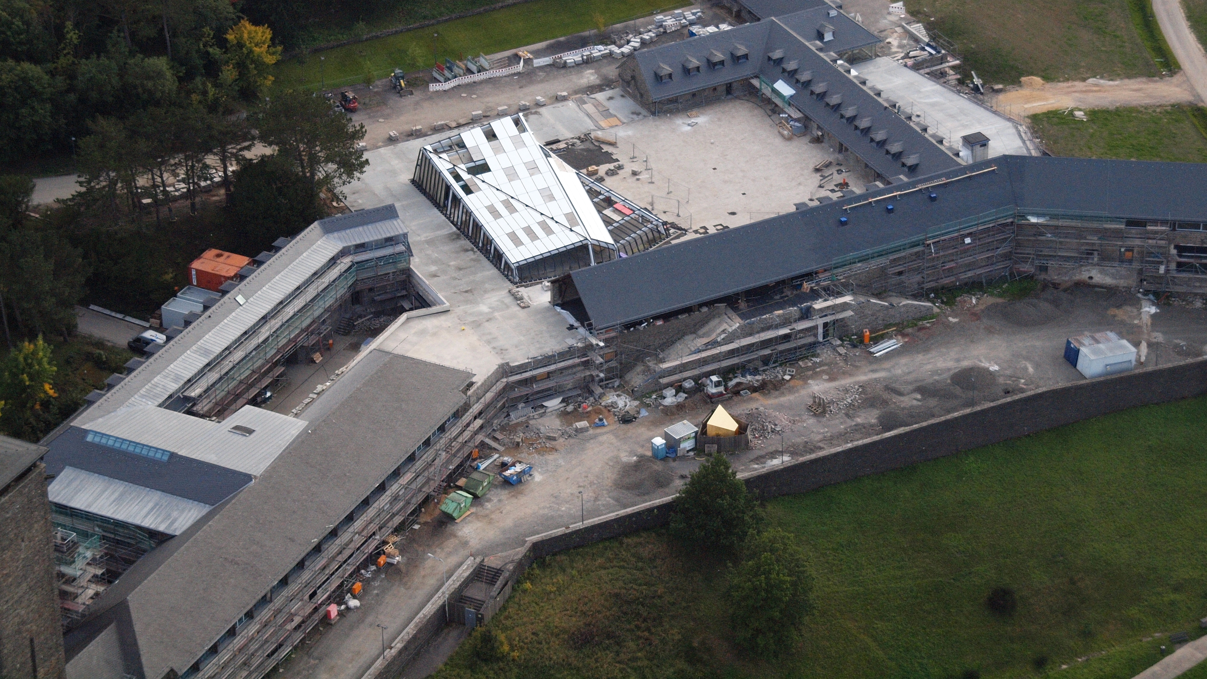 NS-Ordensburg Vogelsang, Neubau Forum, Luftaufnahme (2015)